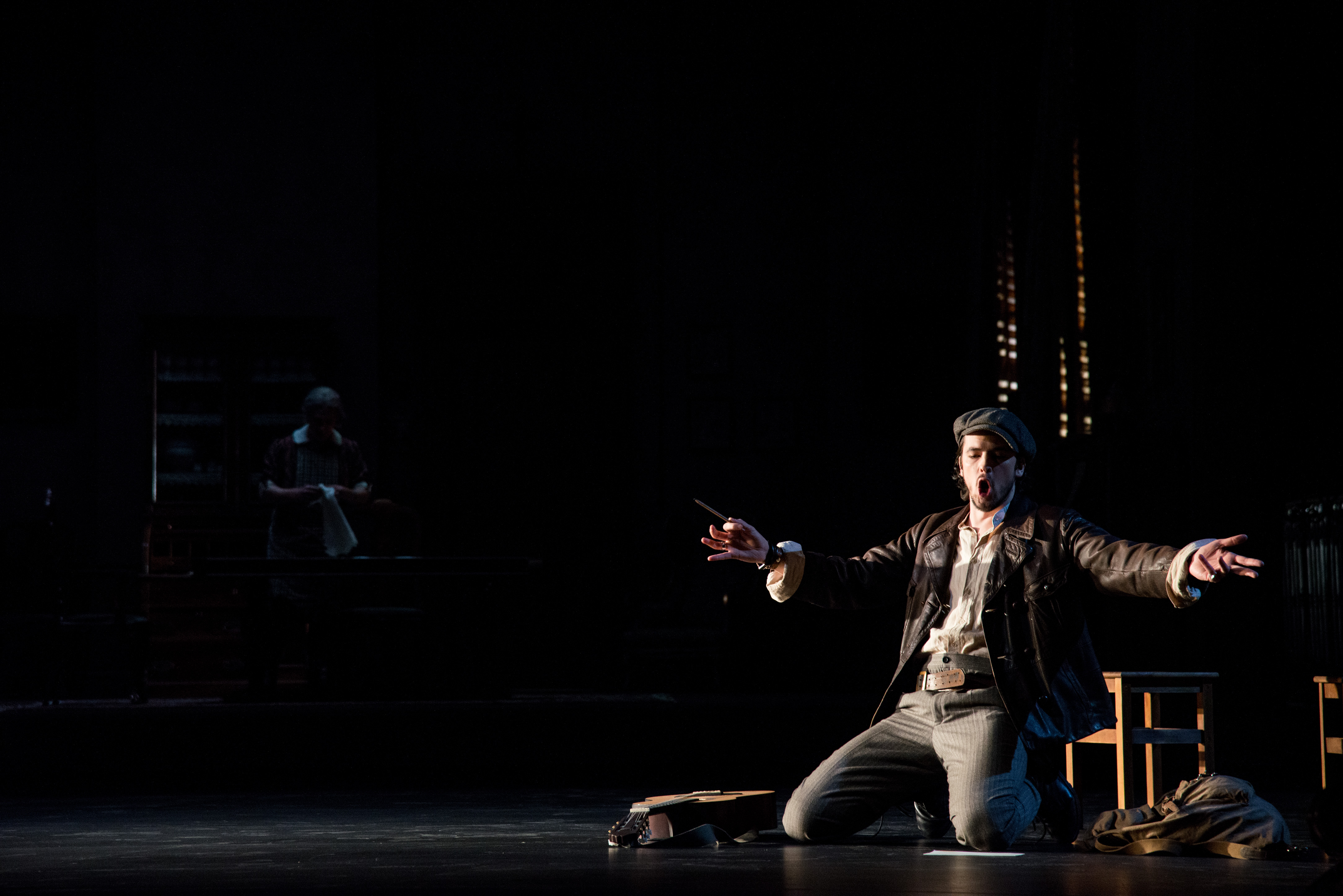 Il barbiere di Siviglia, Theater an der Wien 2015